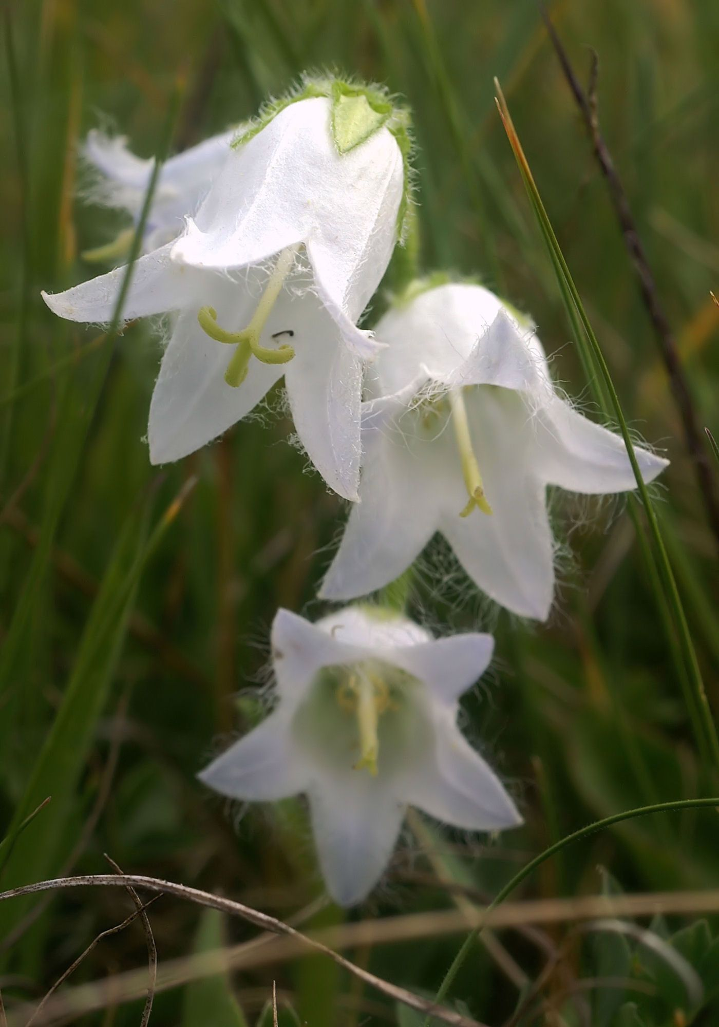 Campanula barbata